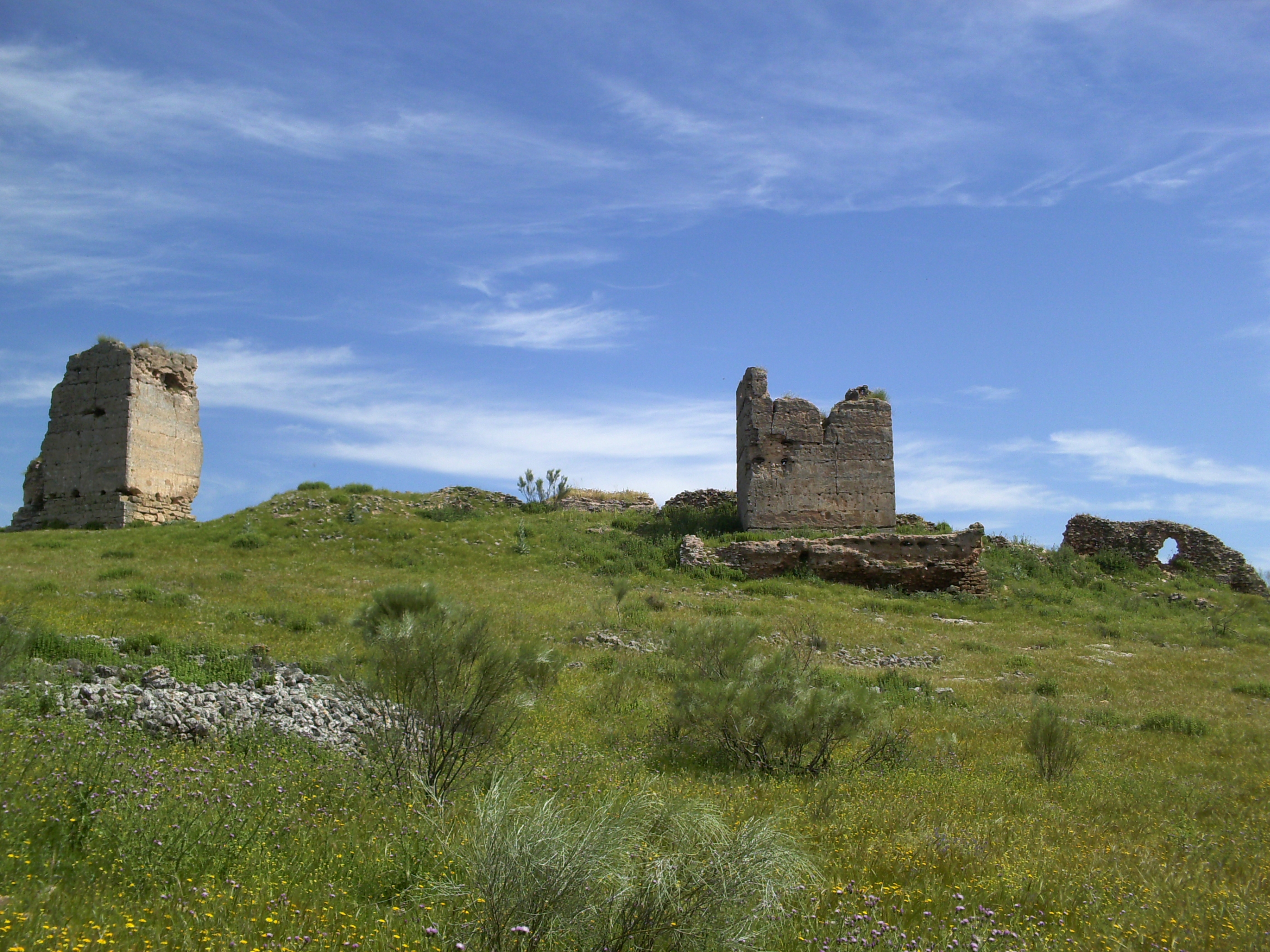 Castillo de Giribaile, en Vilches.